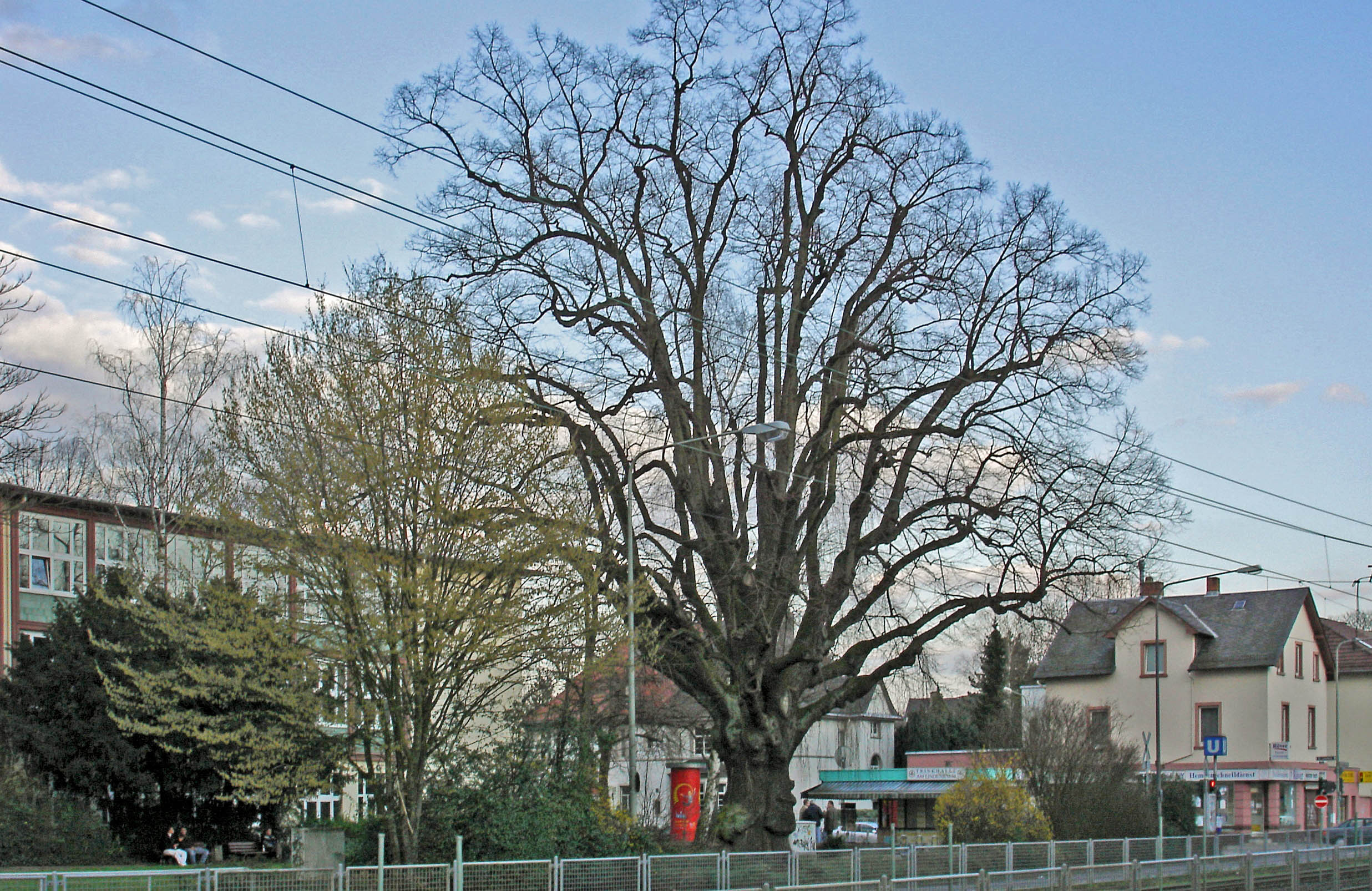 Linde "Am Lindenbaum" in Frankfurt am Main, Eschersheimer Landstraße